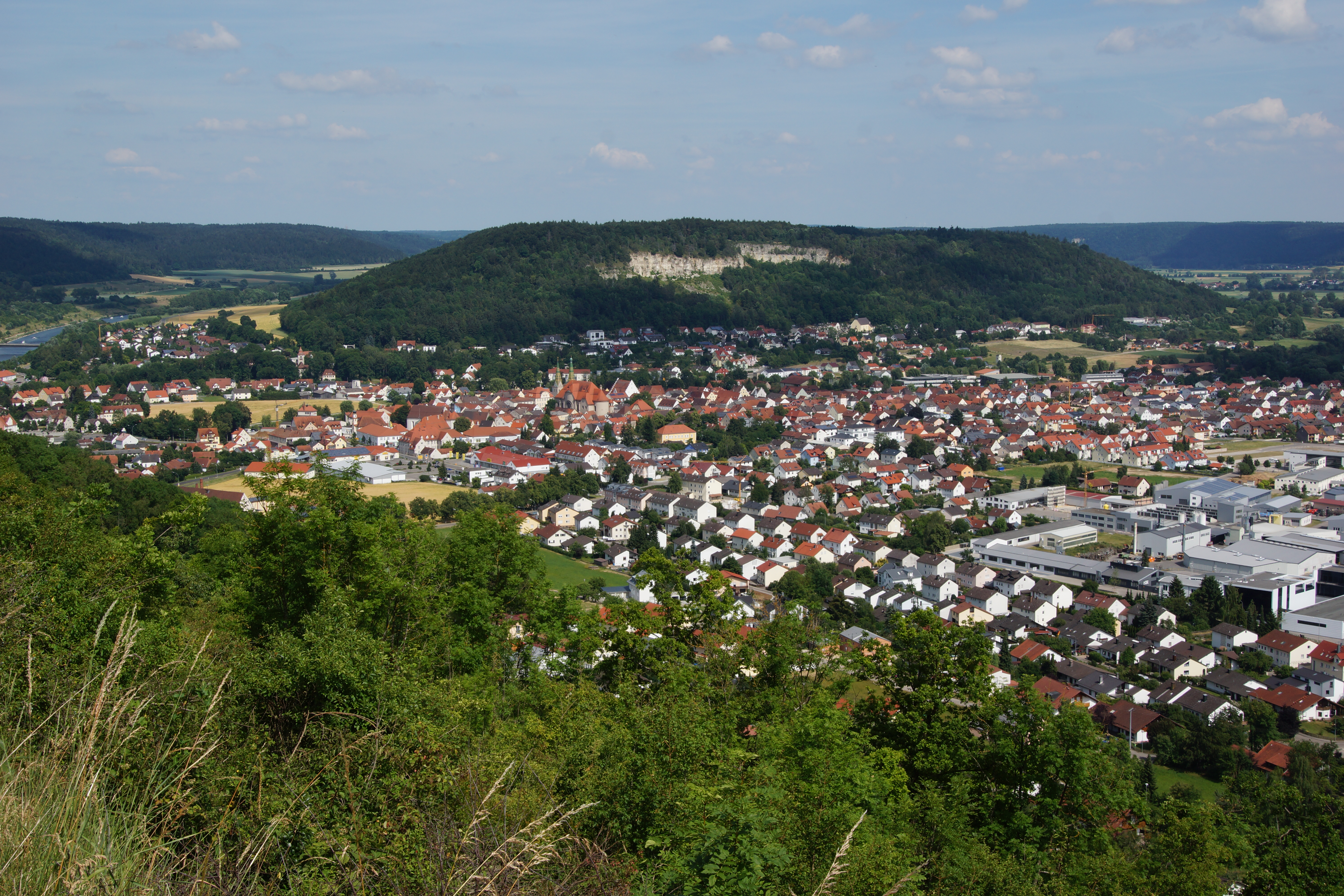 Blick vom Hirschberg auf Beilngries an der Altmühl und den Arzberg.